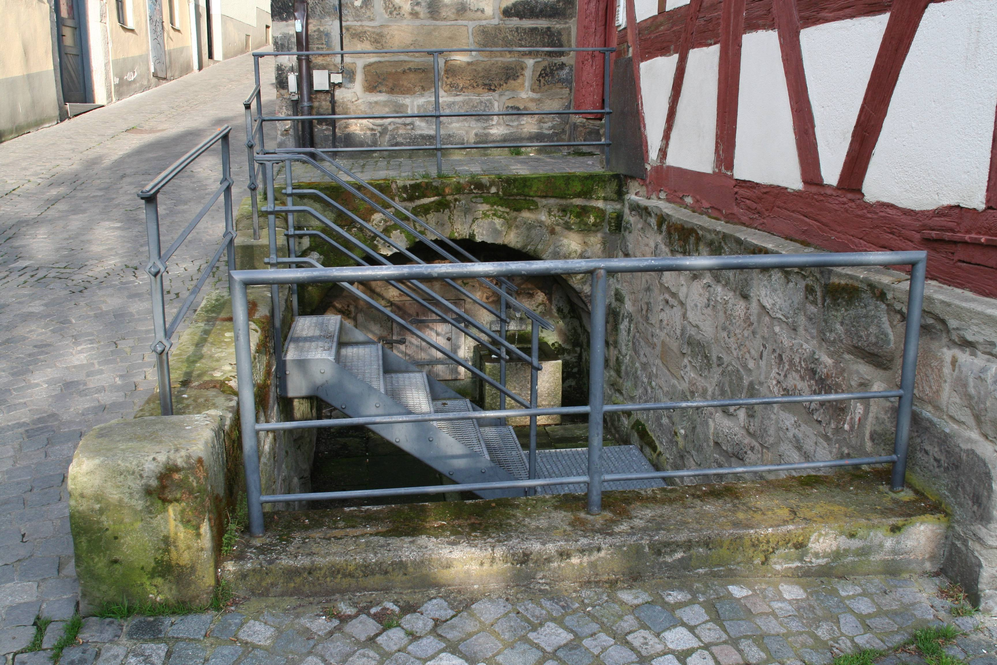 Kindleinsbrunnen am Lohgraben in Coburg